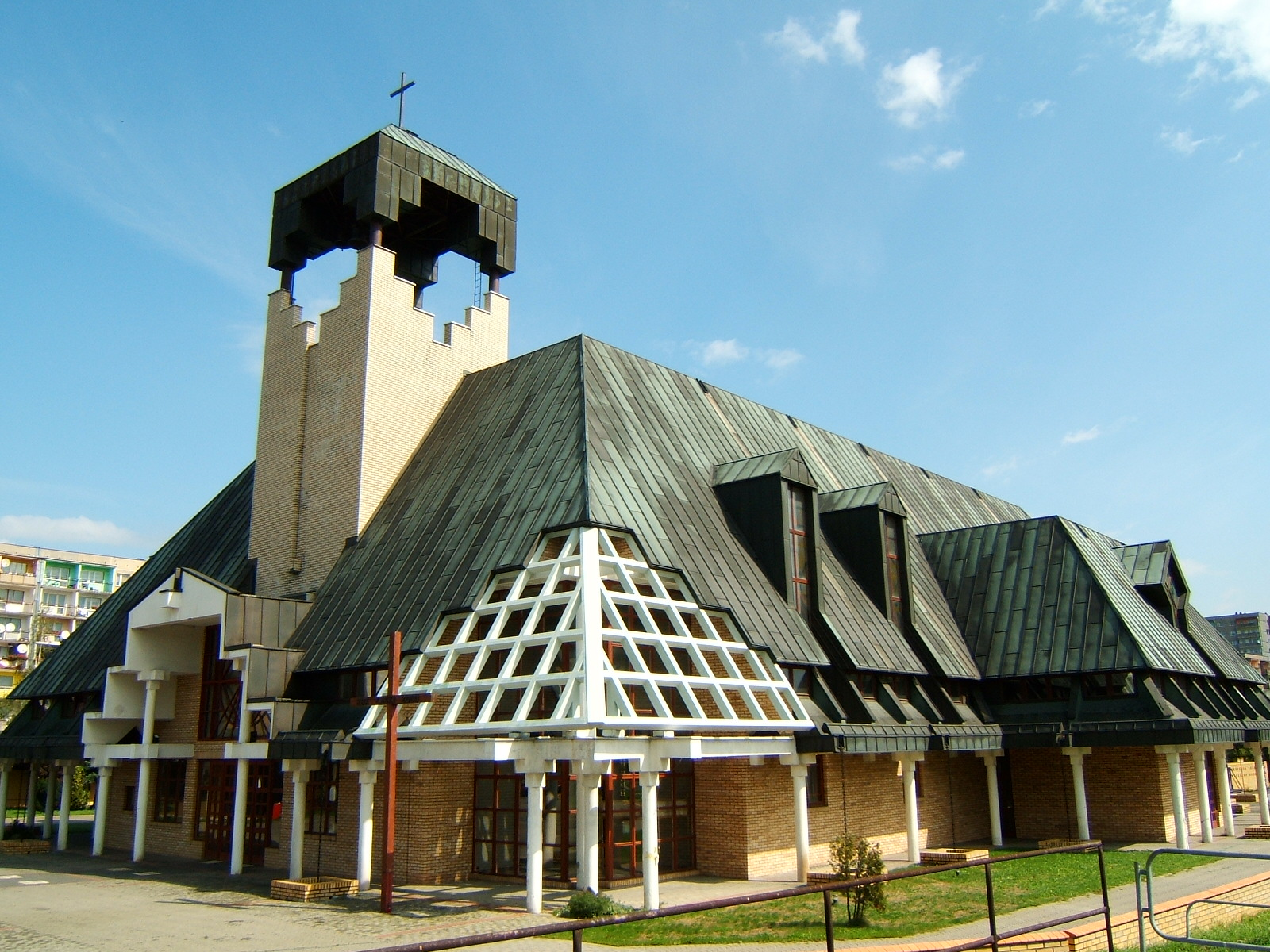 Kościół pw. św. Barbary w Bykowinie - dzielnicy Rudy Śląskiej.